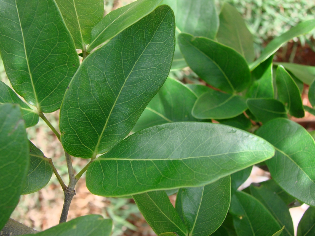 Hymenaea courbaril - FABACEAE Brasília - Distrito Federal - Brasil.